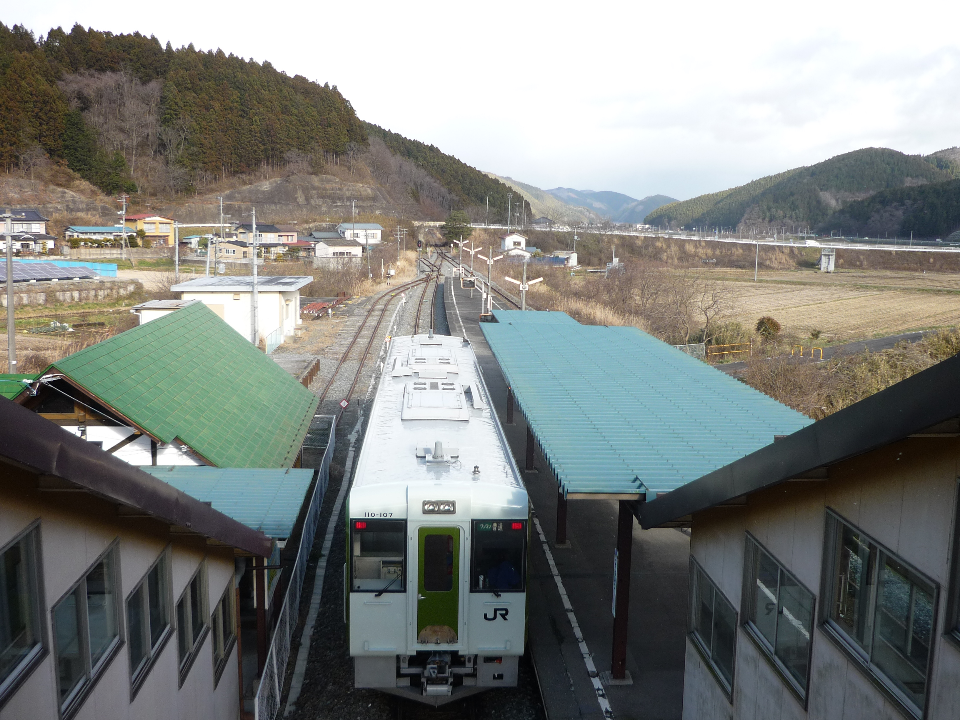 柳津駅跨線橋から気仙沼方面を望む（2015年12月）